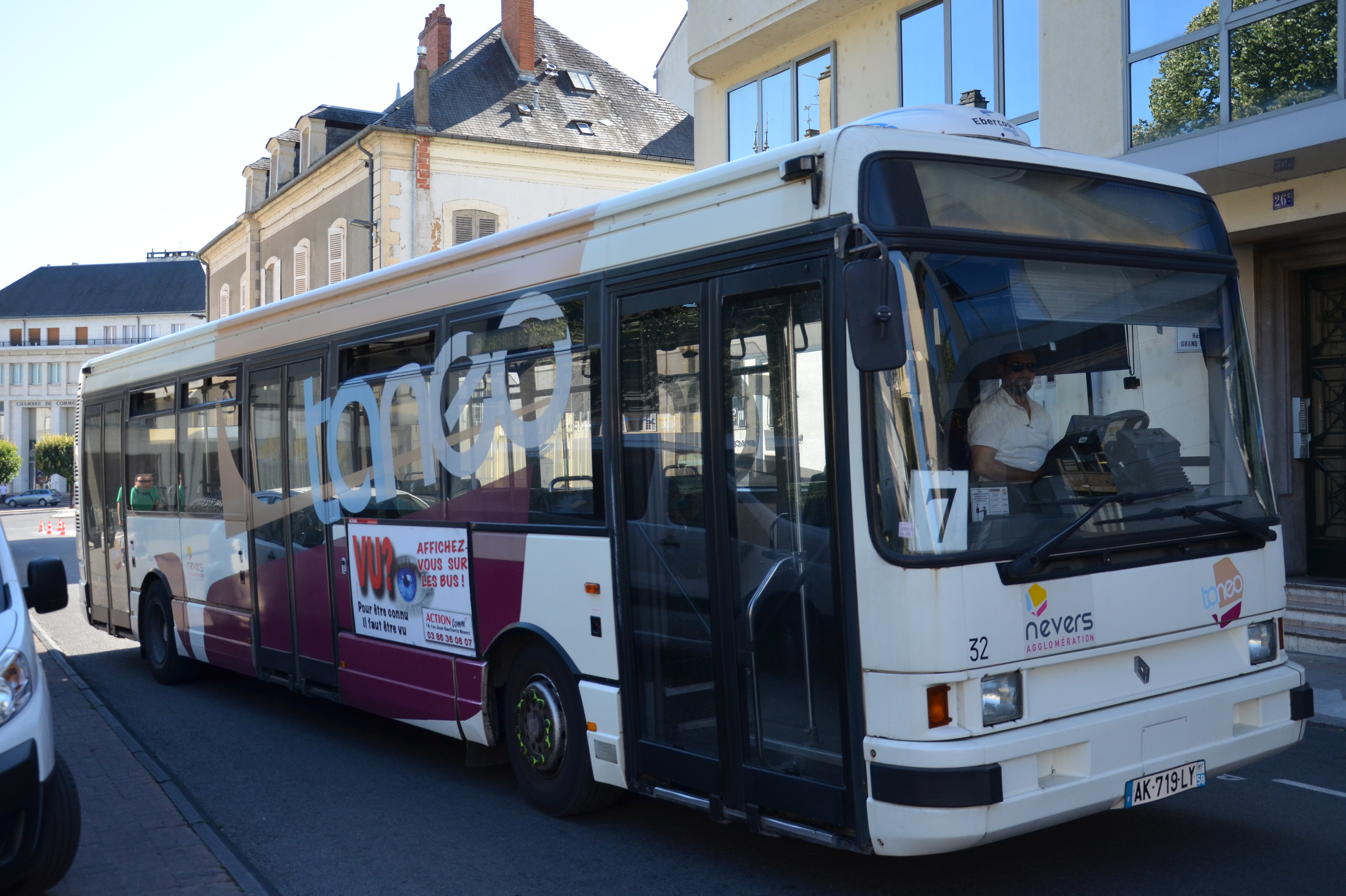 Renault R312 n°32 quittant l'arrêt Carnot Bérégovoy du réseau TANEO de Nevers